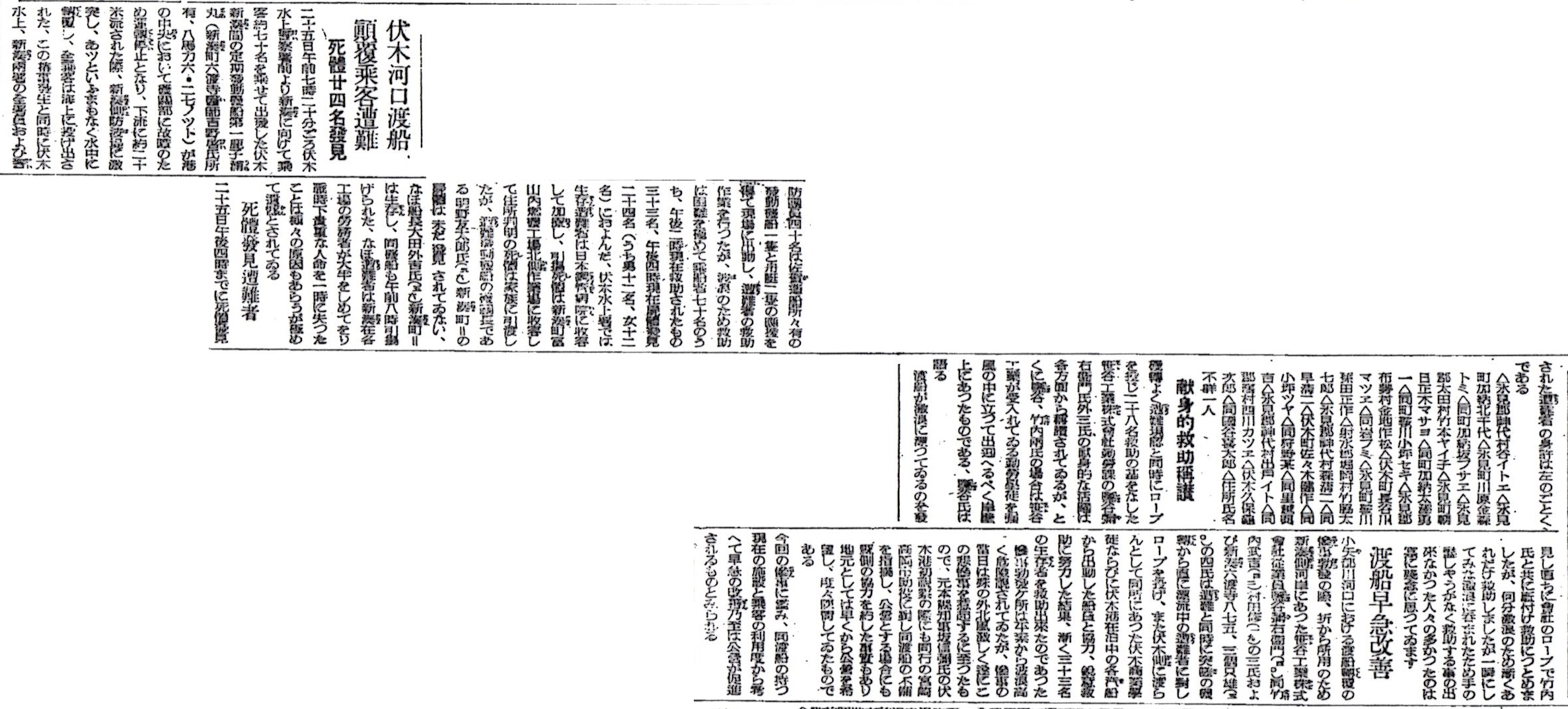 小矢部川河口における渡船の顚覆事故を報道する新聞記事